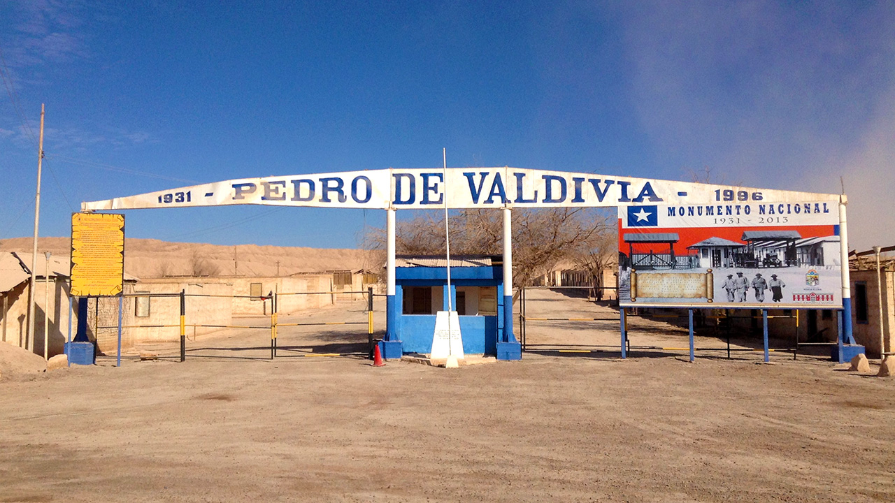 Pórtico Oficina Salitrera Pedro de Valdivia This is a photo of a national monument in Chile: 546